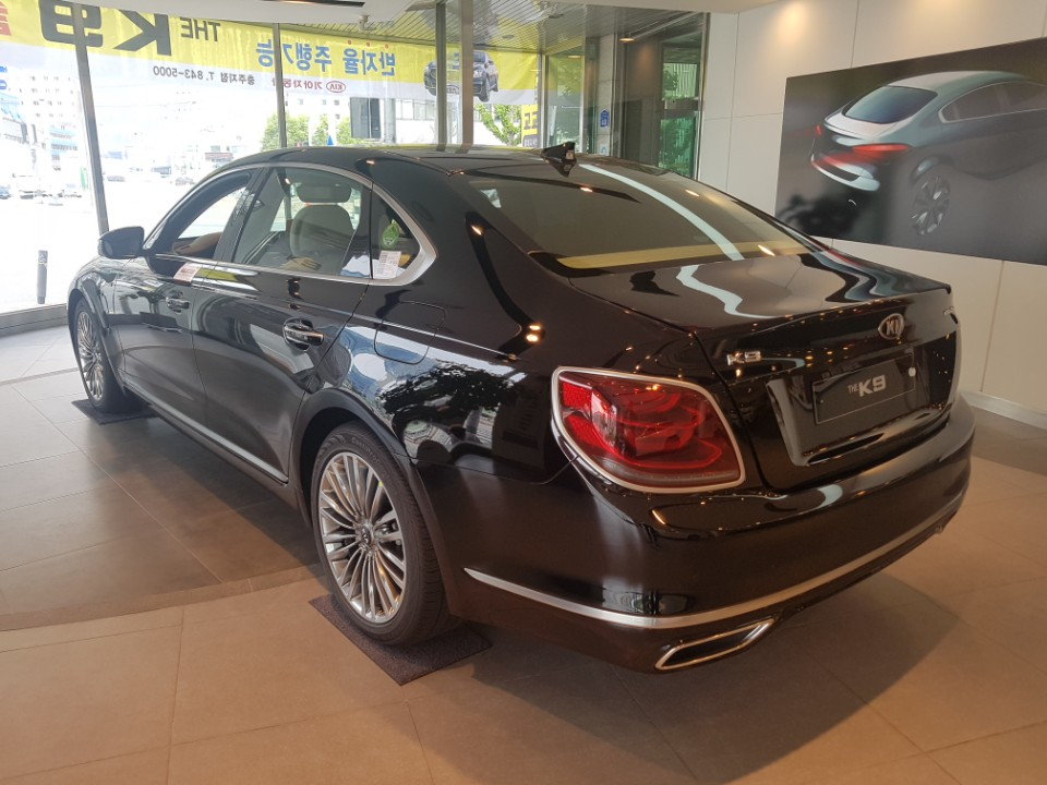 기아 더 K9 후측면